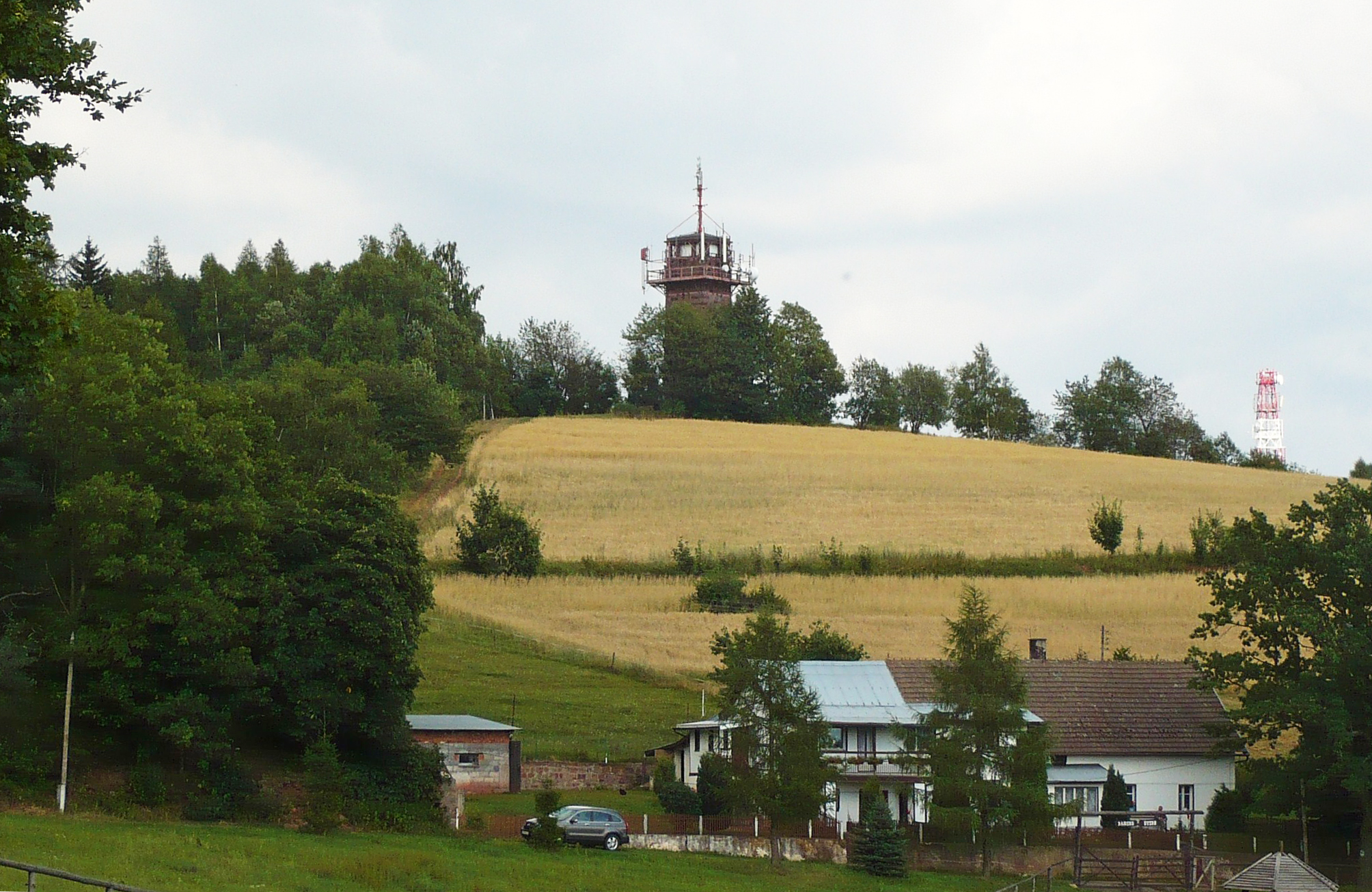 Nowa Ruda, wieża na Górze św. Anny